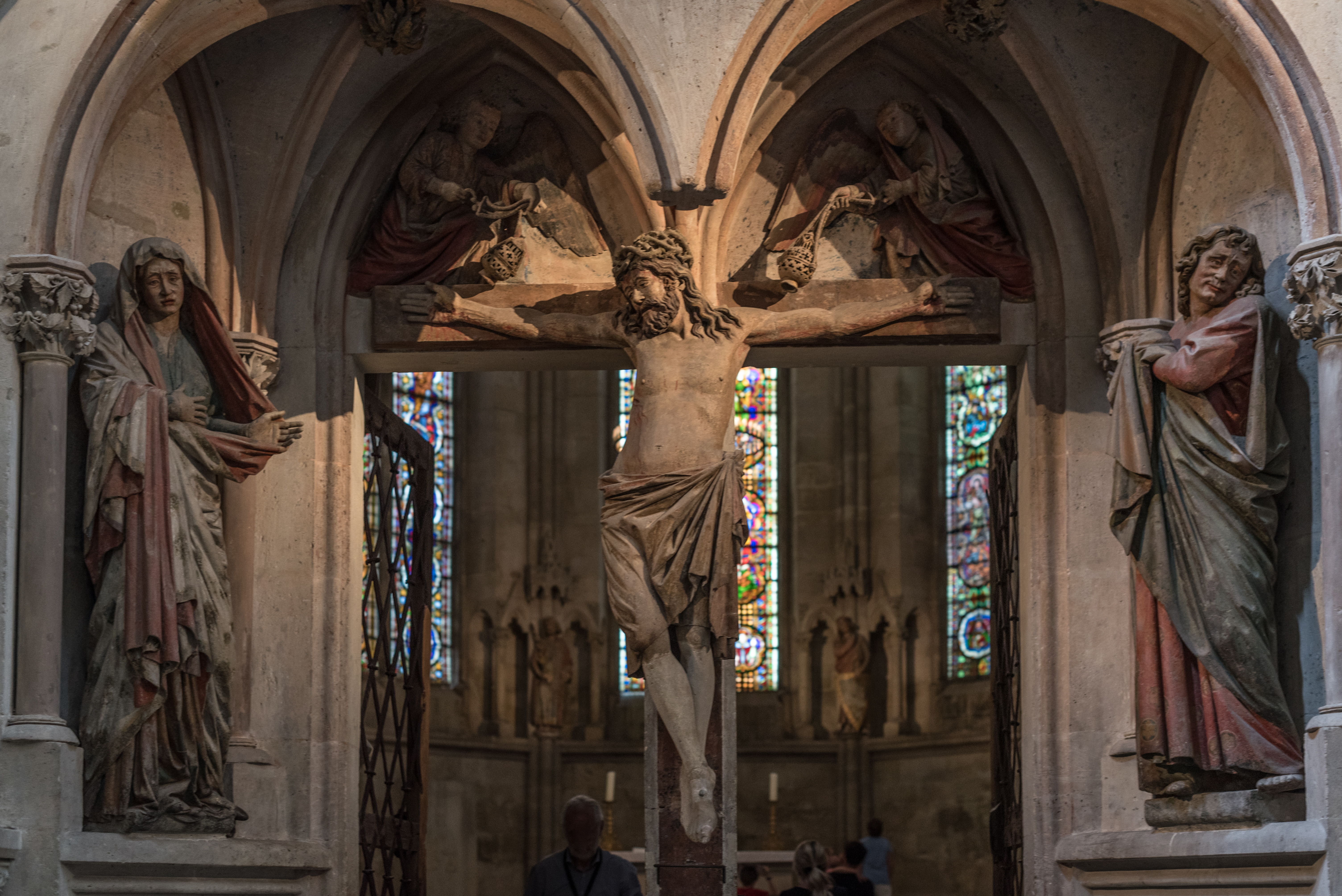 Naumburg an der Saale, Dom, Westlettner